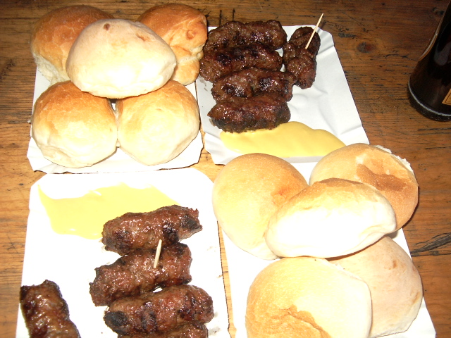 Mici roumains : saucisses elaboree a partir d'un melange de viande fortement apprecier par les roumains